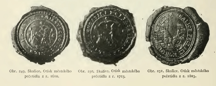 The three Skalice seals still existing. (1610, 1715 and 1803.